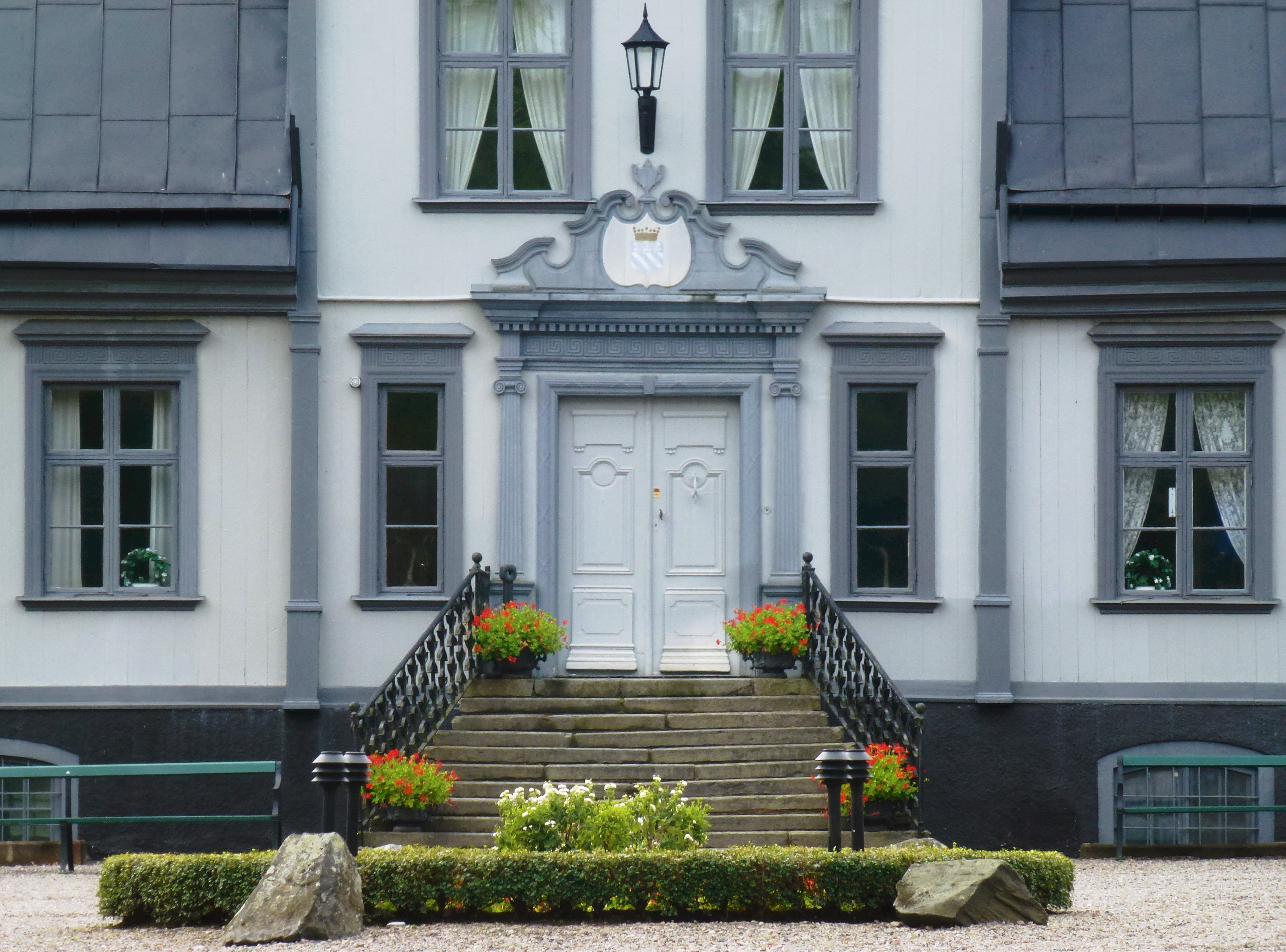 Ludvika herrgård, entré